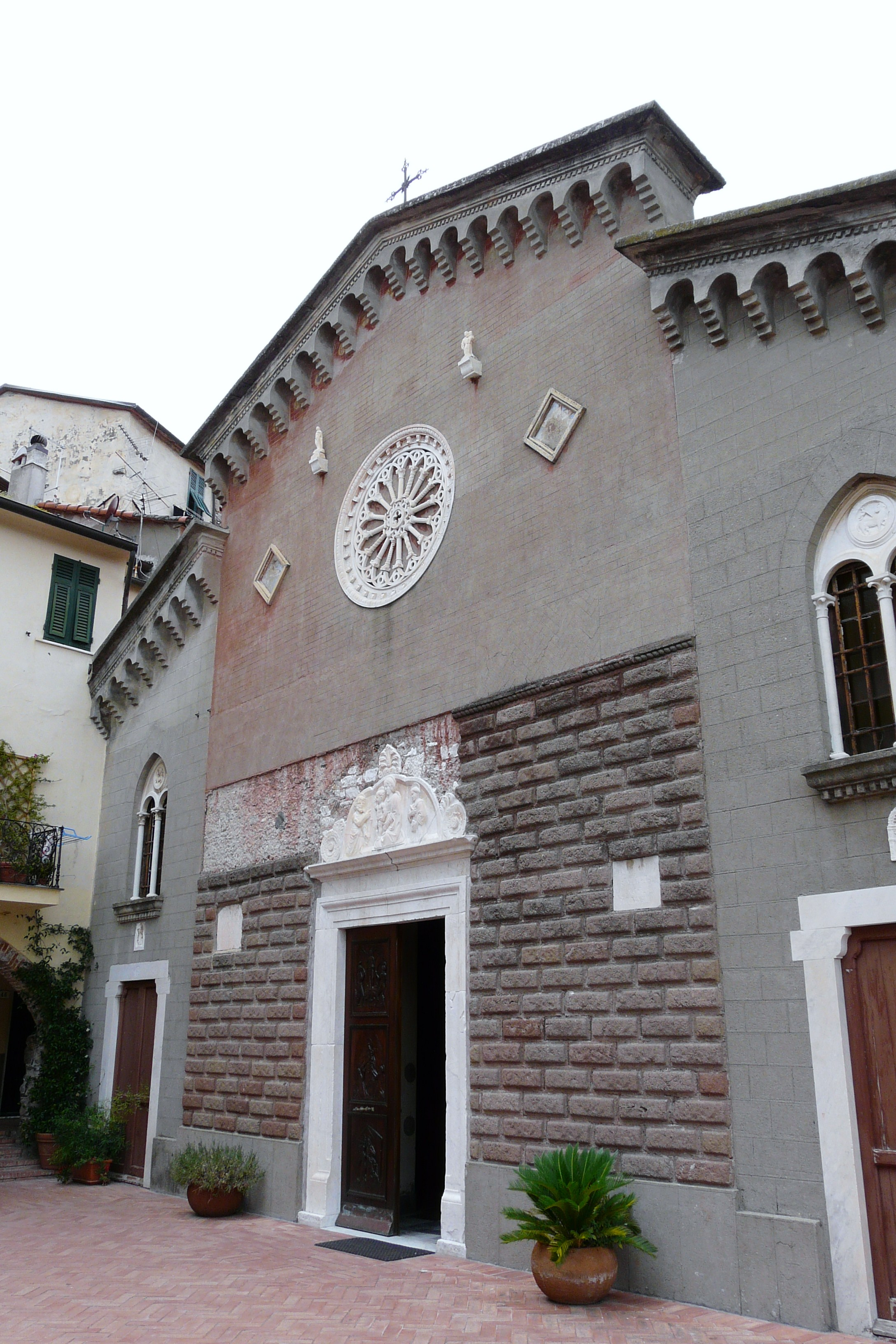 Chiesa di San Vincenzo, Ameglia, Liguria, Italia